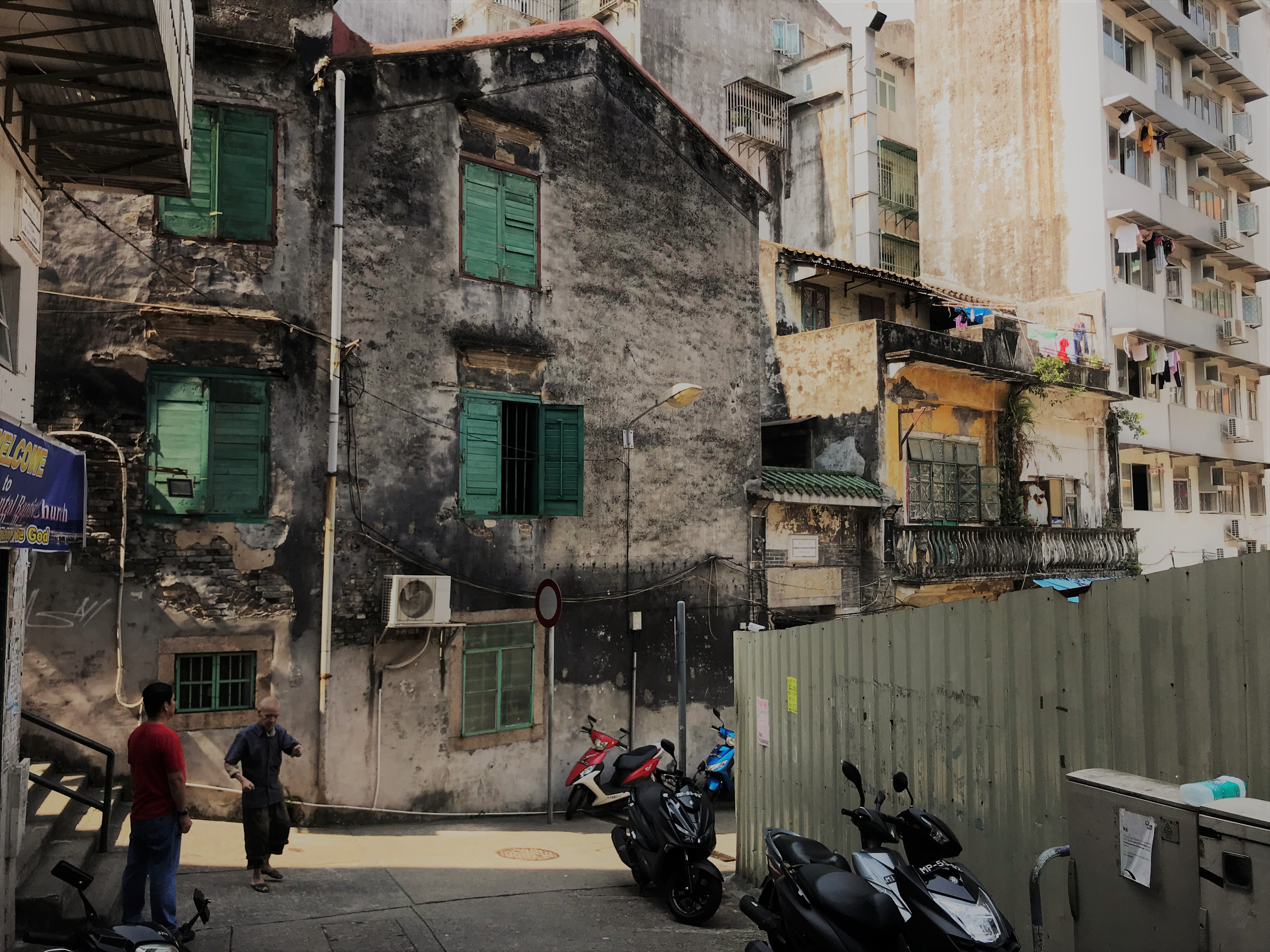 鳳仙圍外圍及入口